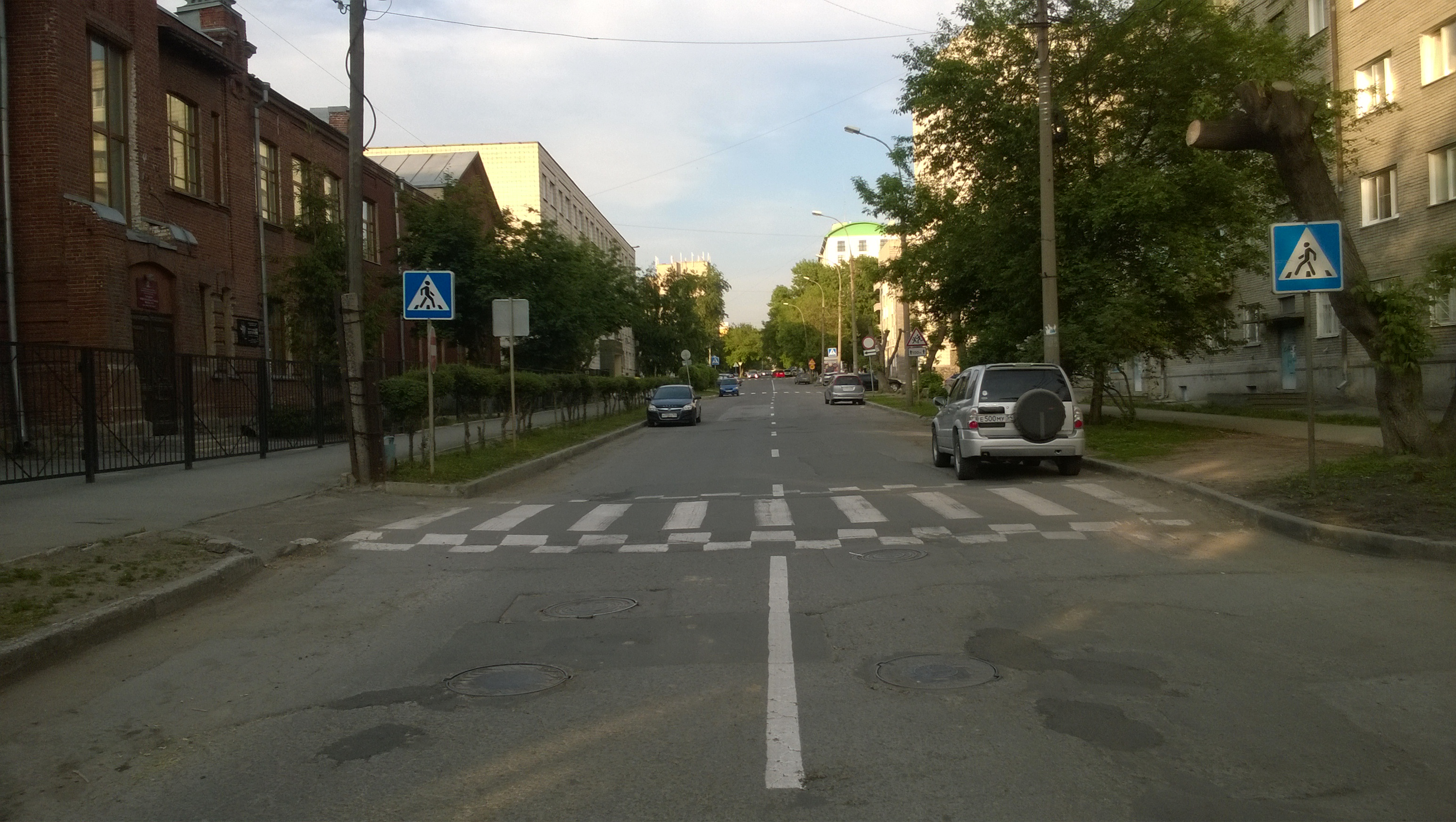 Октябрьская улица в июне 2014 года. Новосибирск